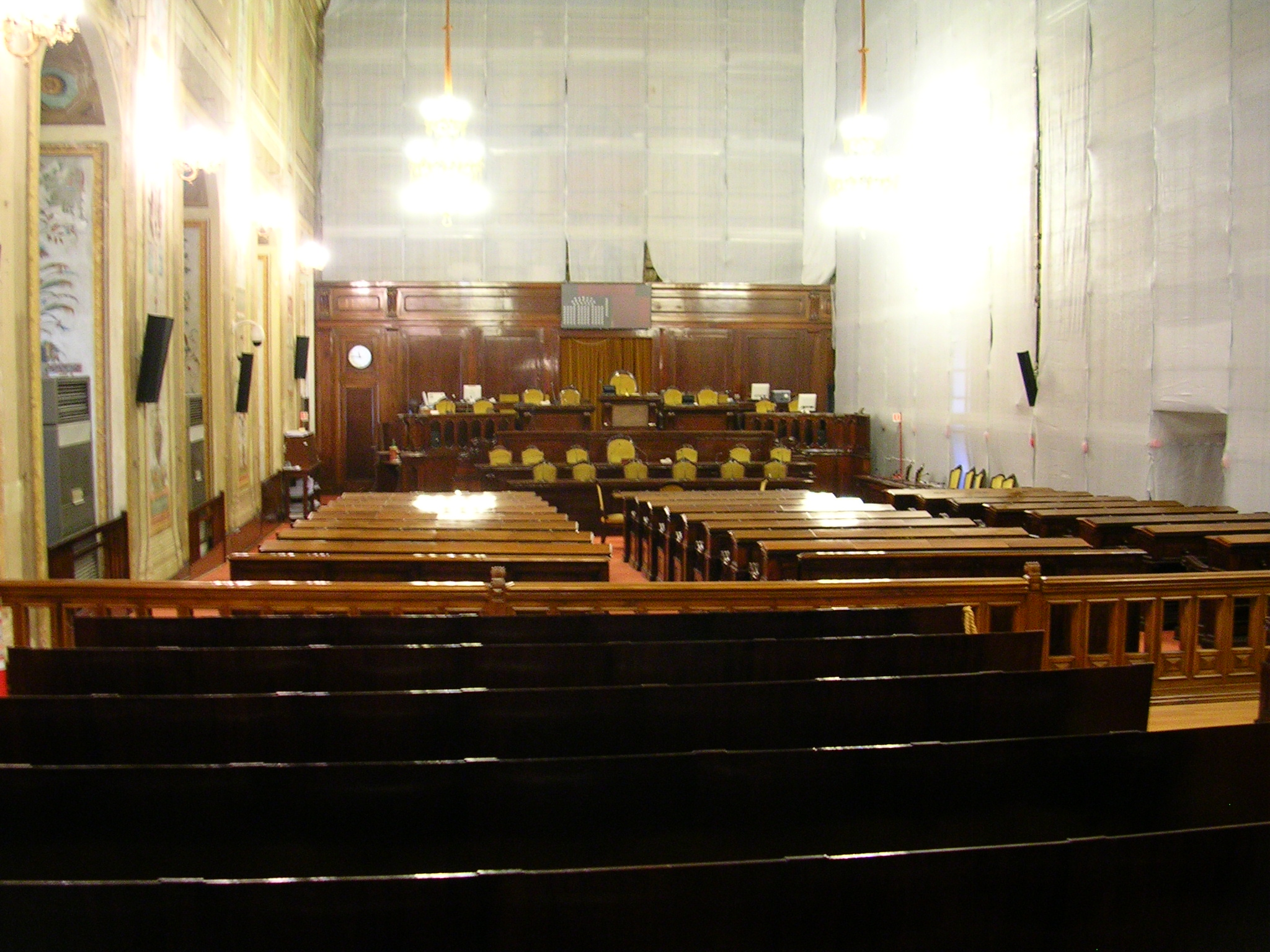 Sala d'Ercole in restauro. Aula delle sedute dell'Assemblea Regionale Siciliana, nel Palazzo dei Normanni a Palermo - Sicily - Italy.